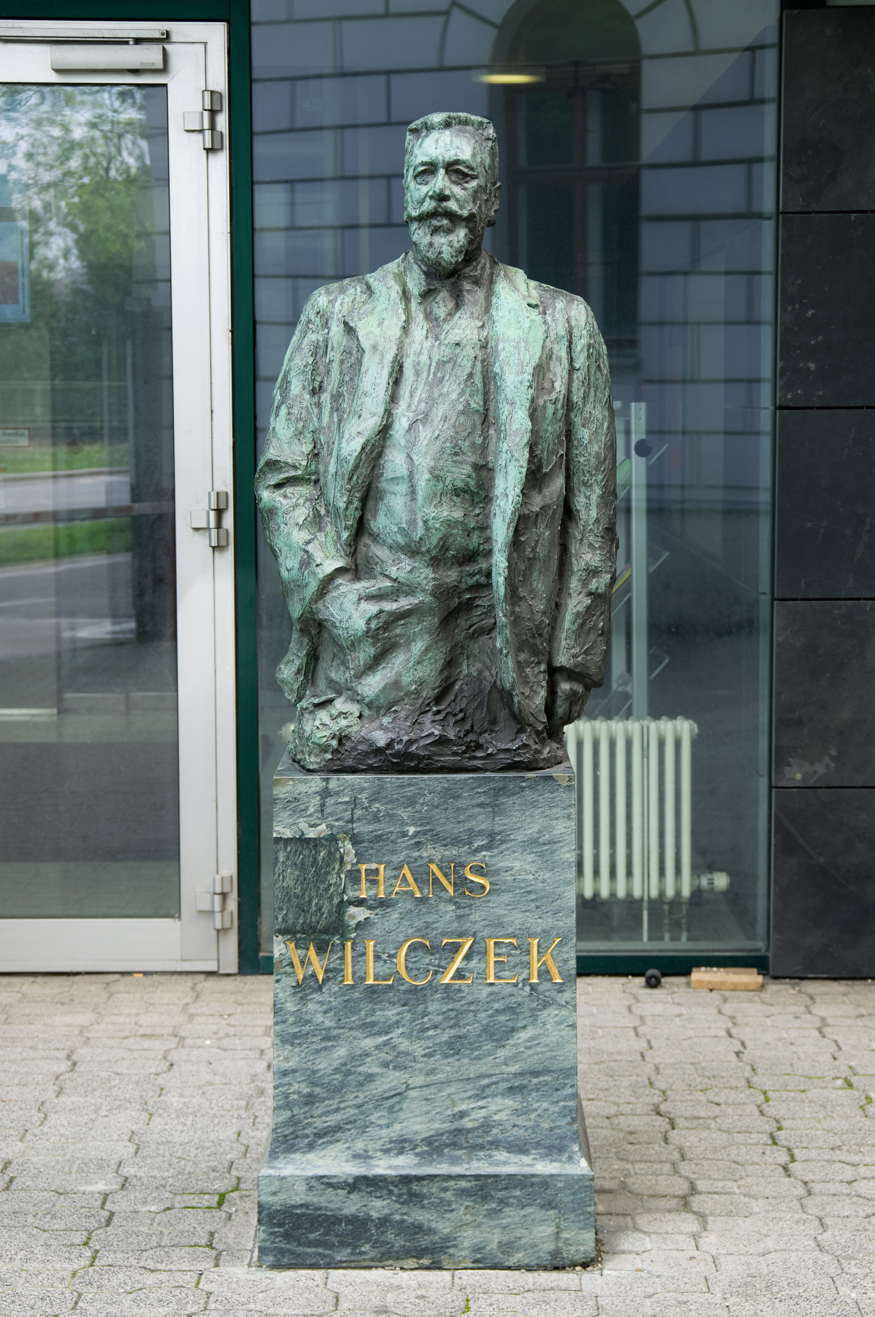 Artist: Feodorovna RIESS Johann Nepomuk Graf Wilczek Im Durchgang zwischen dem Altbau und dem Neubau der Wiener Rettung Obere Weißgerberstraße 2, Ecke Radetzkystraße 1 1030 Wien